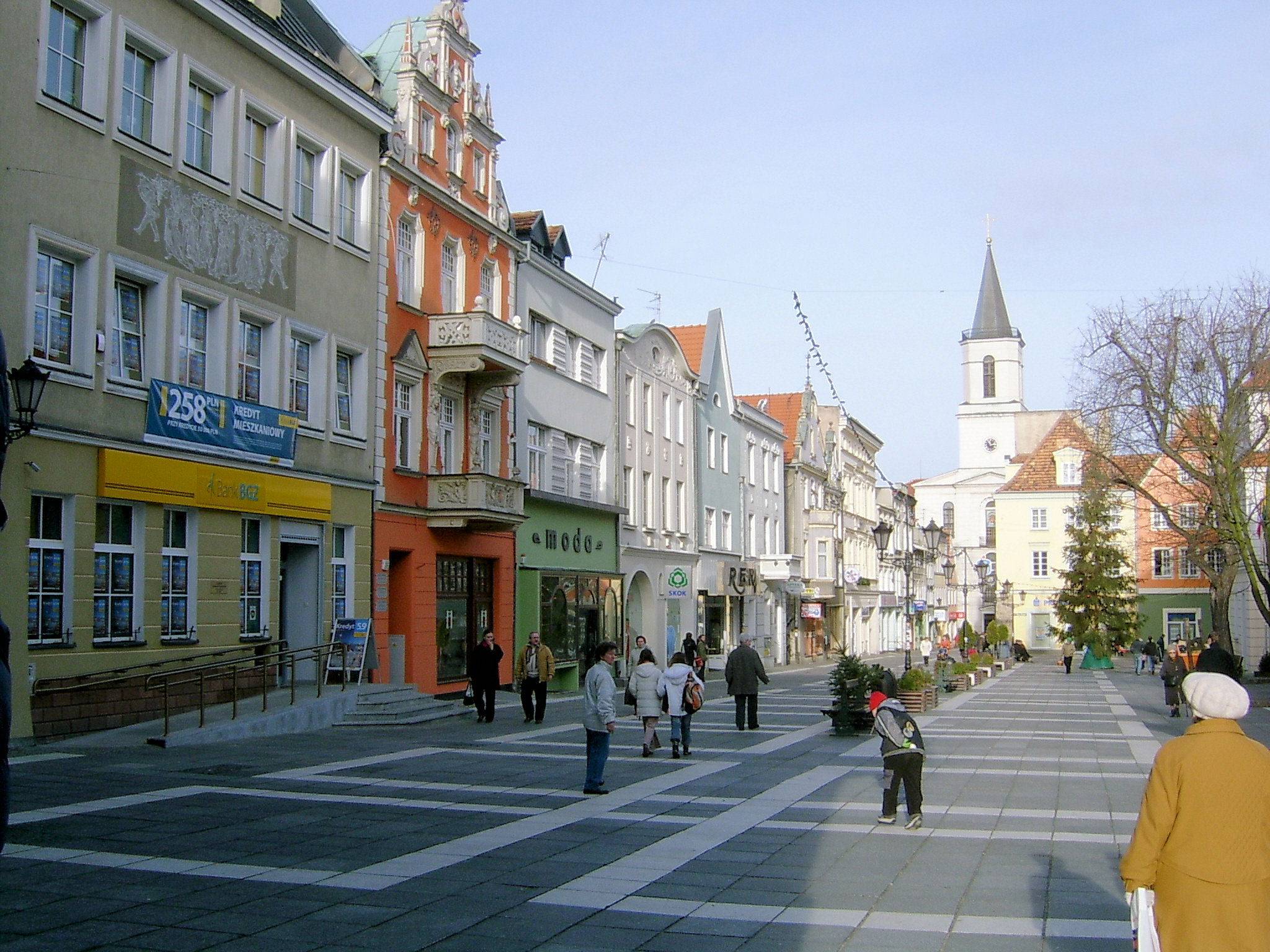 Zielona Góra, Stary Rynek